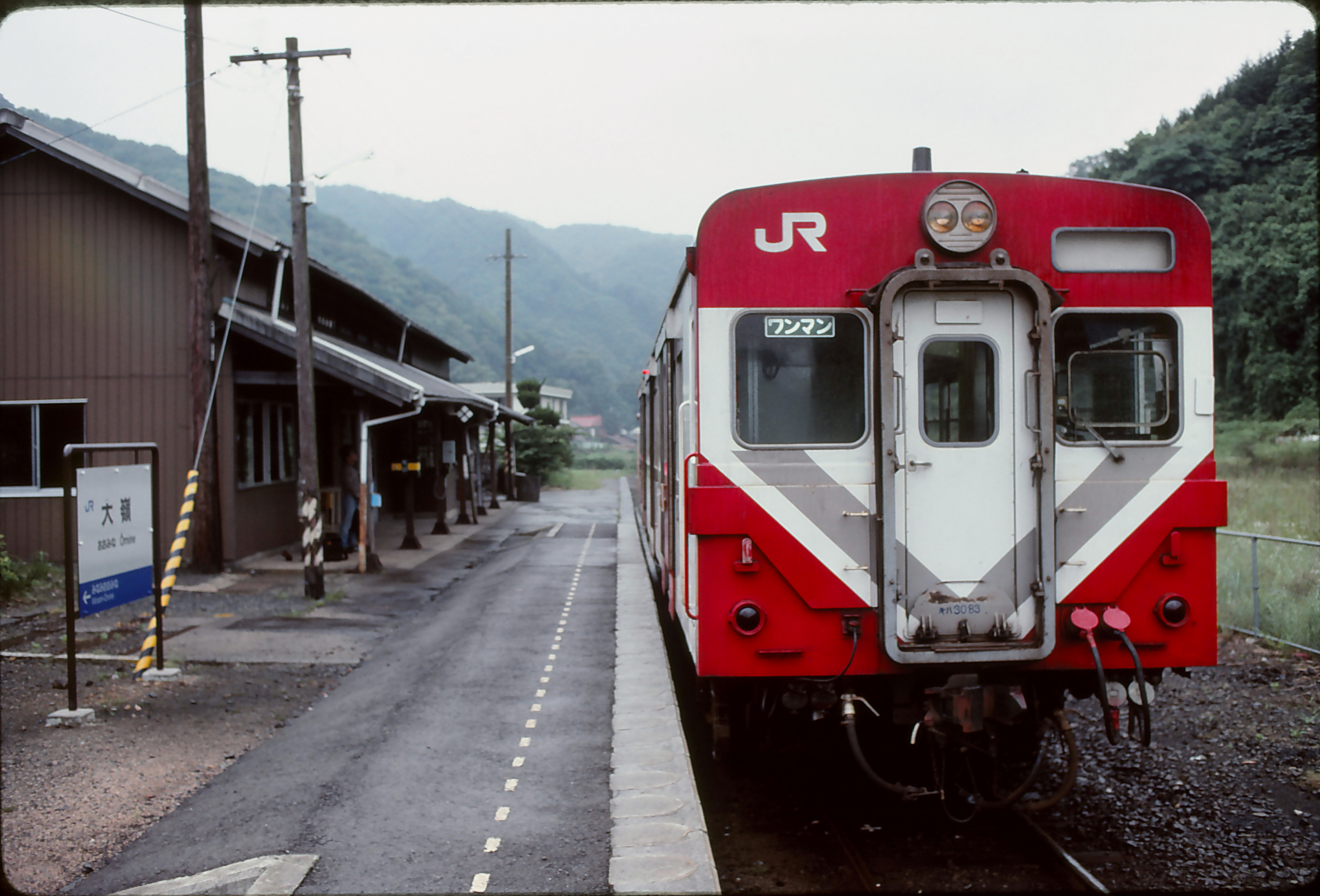 美祢線 大嶺支線 大嶺駅に停車中のキハ30